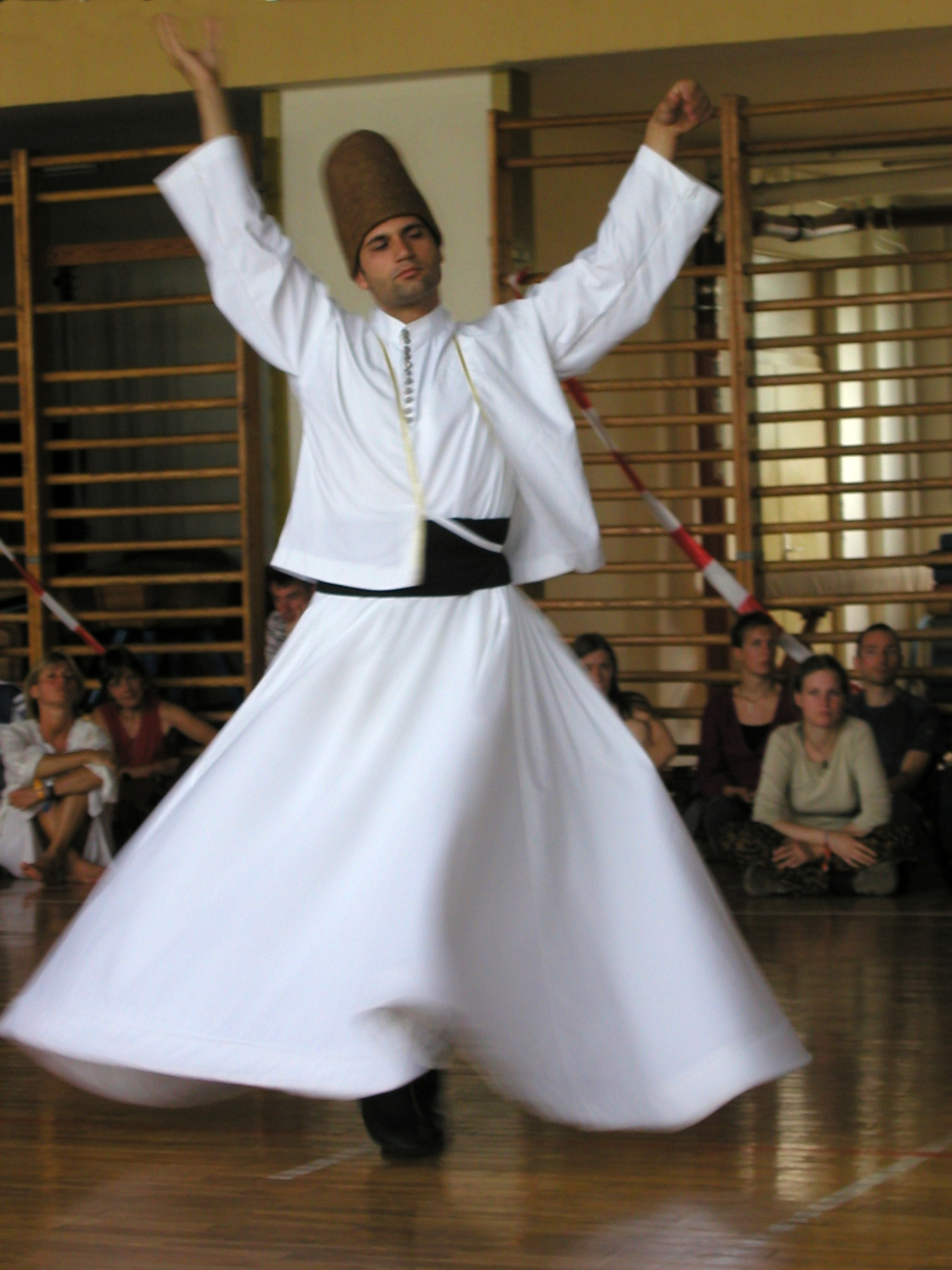 Workshop at TFF.Rudolstadt